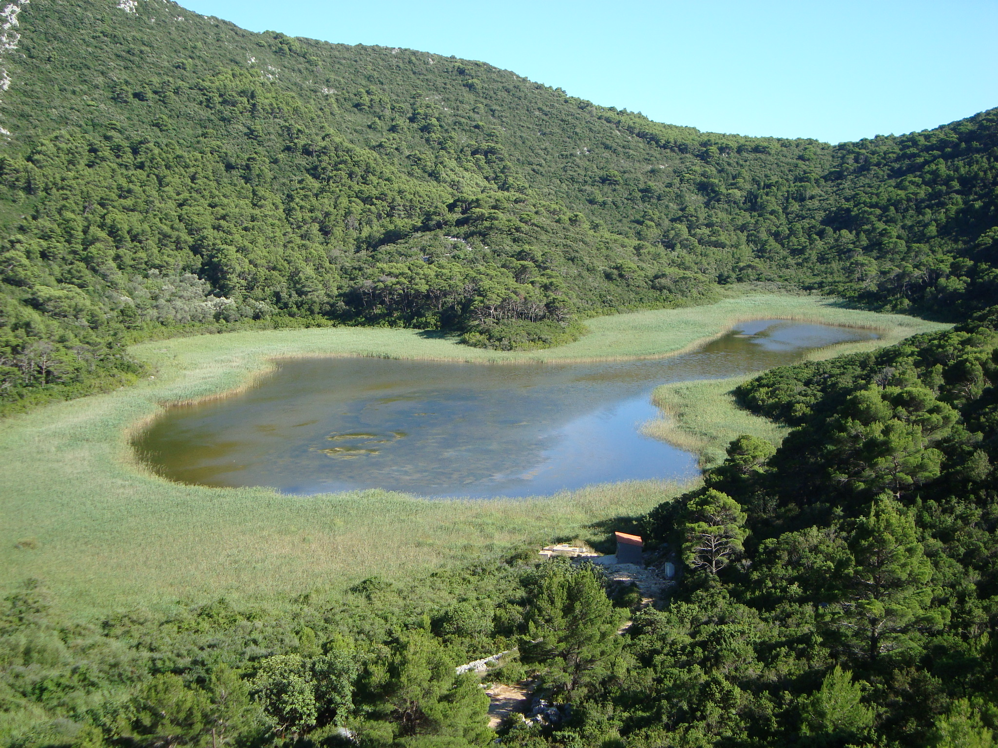 Blatina u Sobri, vrlo duboko jezero s bočatom vodom